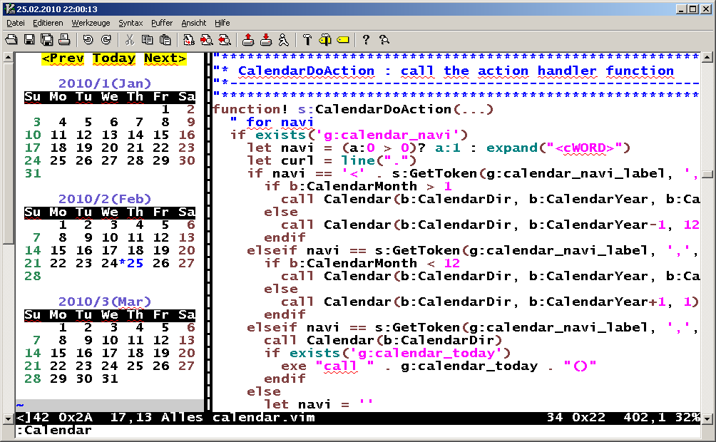 Vim-Skript am Beispiel der Kalender-Funktion "calendar.vim" (Version 2.0, Autor: Yasuhiro Matsumoto). Im linken Fenster ist der Kalender zu sehen. Mit den Pfeiltasten nach rechts bzw. nach links kann man einen Monat vor bzw. zurück gehen. Analog dazu gehen die Pfeiltasten nach unten bzw. nach oben ein Jahr vor bzw. zurück. Doppelklick auf "Today" zeigt den aktuellen Monat wieder in der Mitte an. Im rechten Fenster ist ein Ausschnitt aus dem Skript zu sehen, der in der Vim eigenen Skript-Sprache programmiert ist. Über die -scripts-Site können vim-Programmierer ihre Skripte anderen Nutzern zur Verfügung stellen.